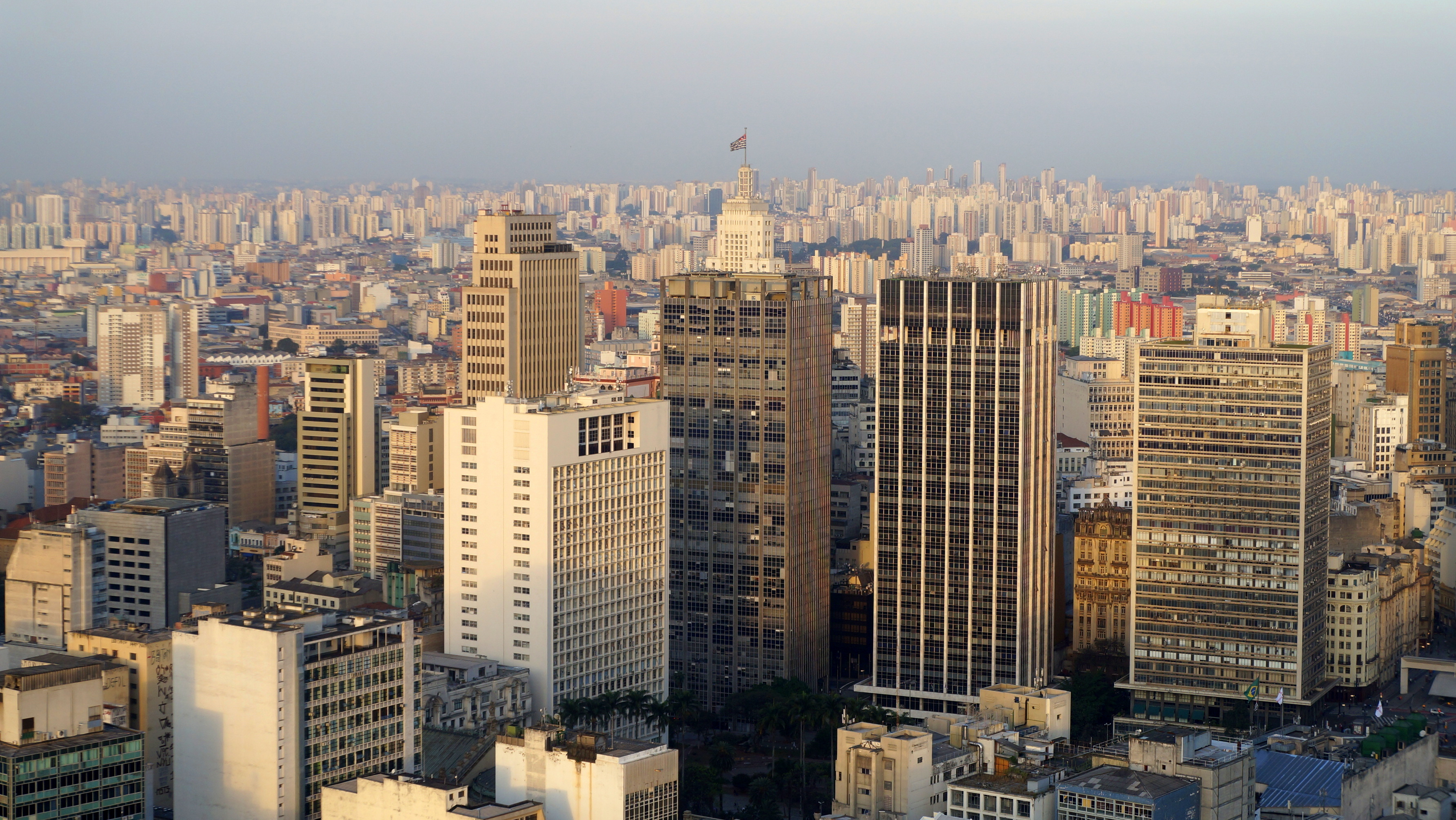 Edifício Itália skyscraper, São Paulo (SP), Brasil.